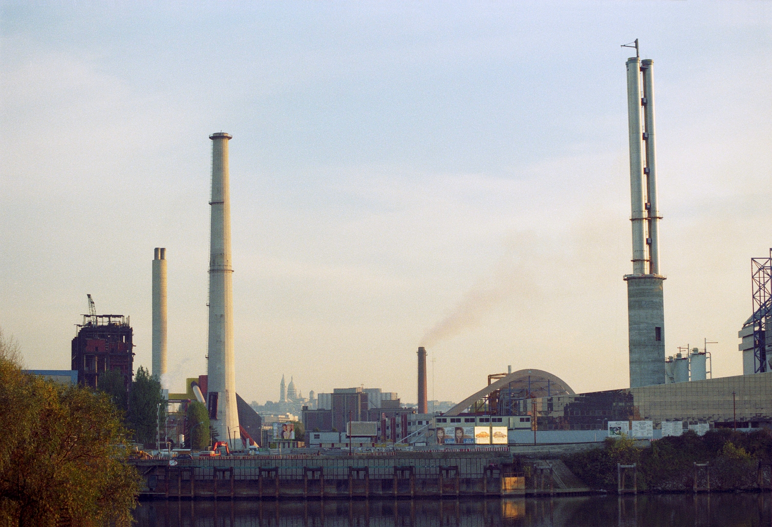 Cheminées d'usines à Saint-Ouen (Seine-Saint-Denis) en 1989.